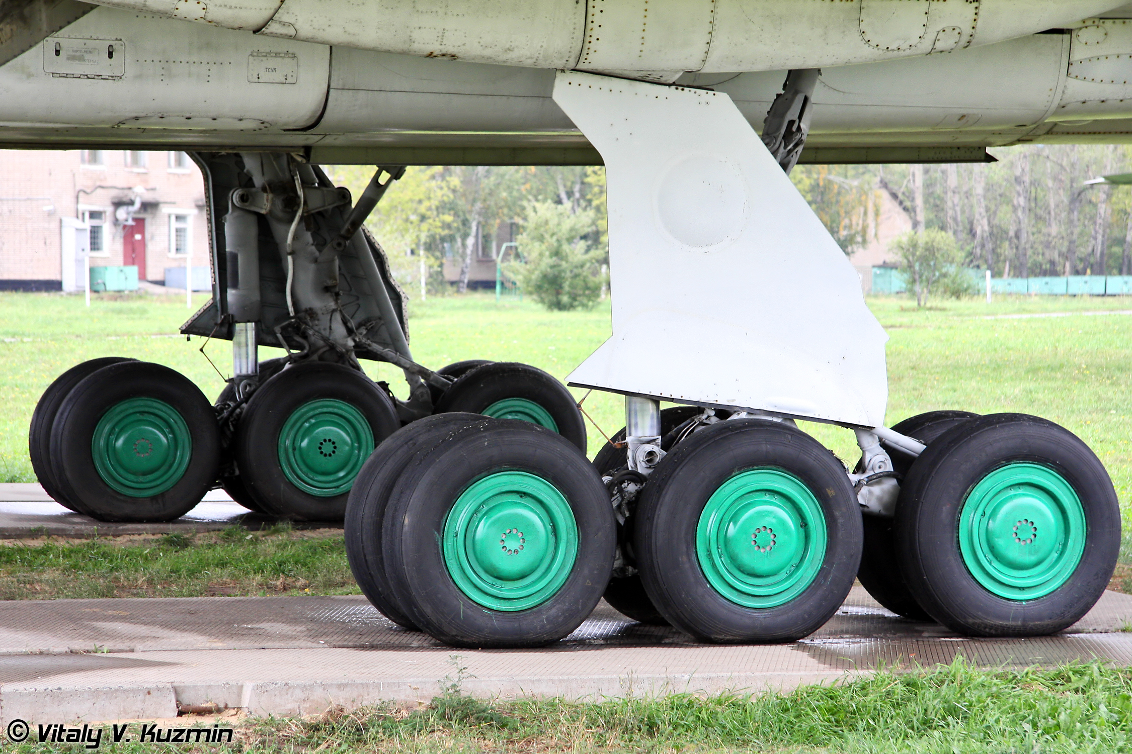 Ту-22М3 (Tu-22M3 Backfire-C)